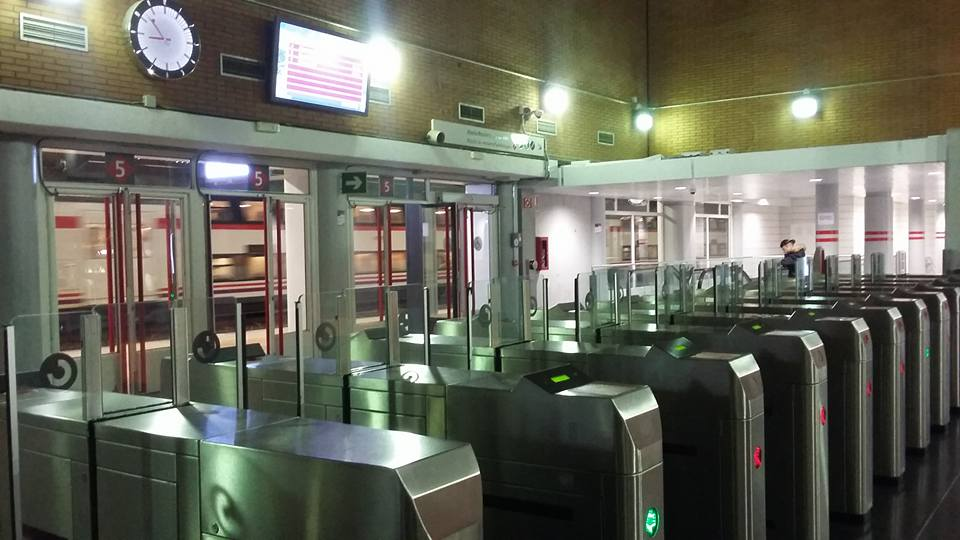 Vestíbulo de la estación de Torrejón de Ardoz (Comunidad de Madrid).